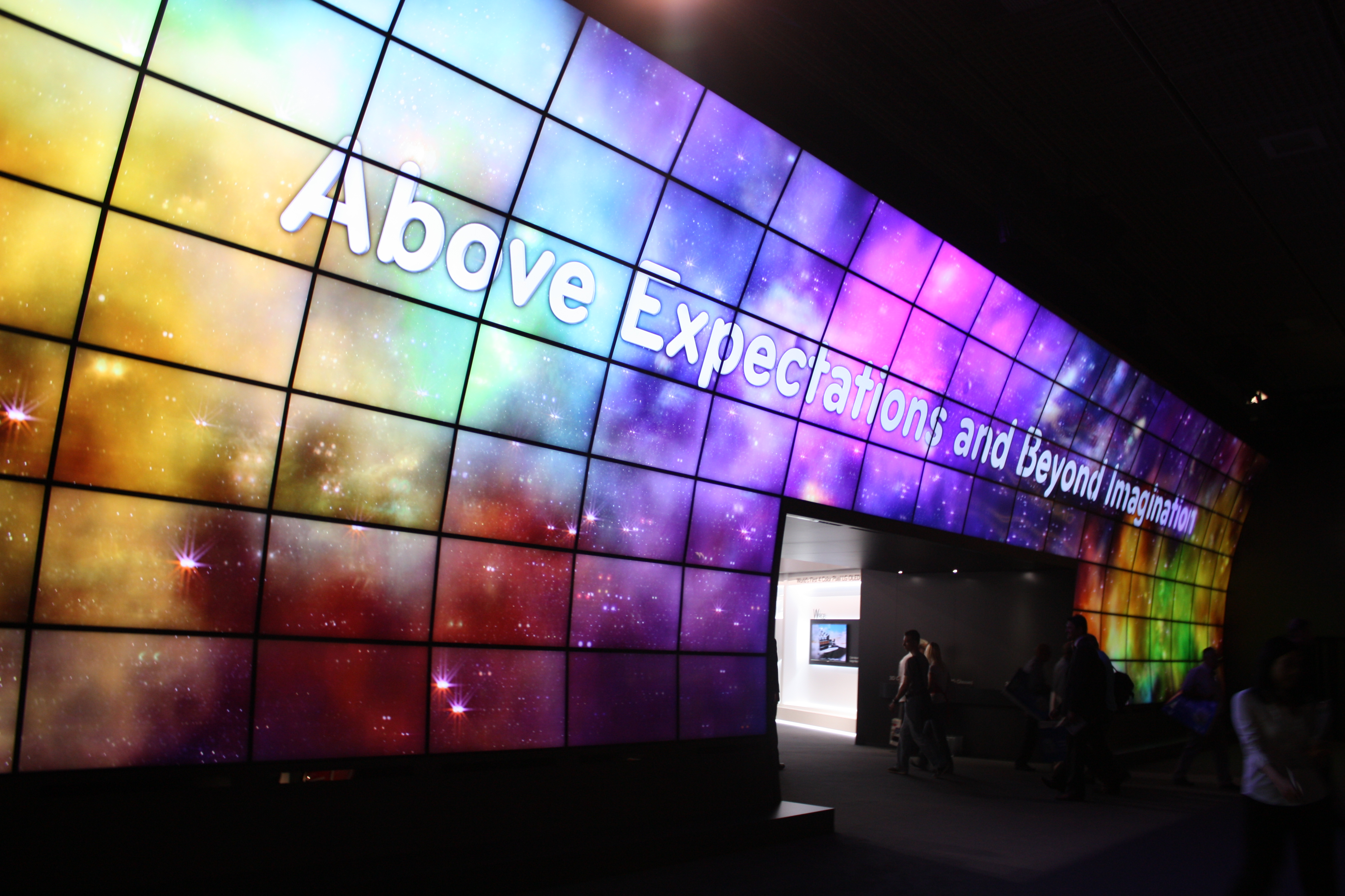 Internationale Funkausstellung 2012